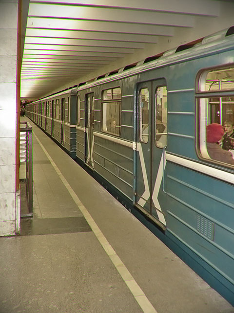 Baureihe 81-717/714, Seitenansicht.